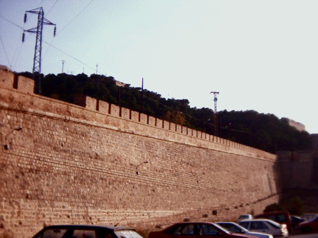 Cartagena. Muralla de Carlos III. Único tramo con almenas originales. Tramo junto a la rambla de Benipila.